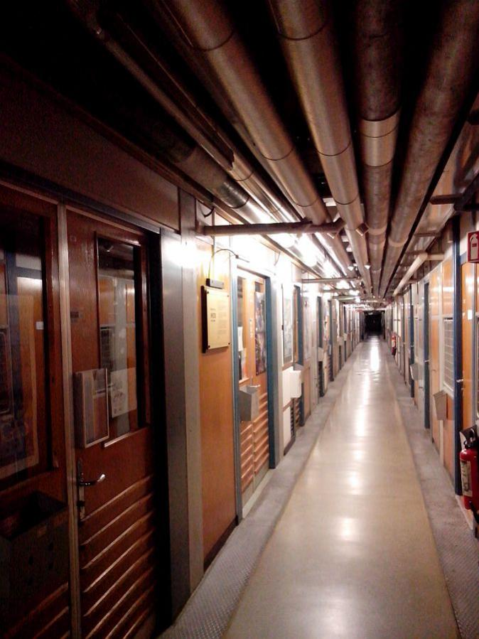 Калідор, у якім была народжана WWW. Першы паверх будынка №1 у CERN.